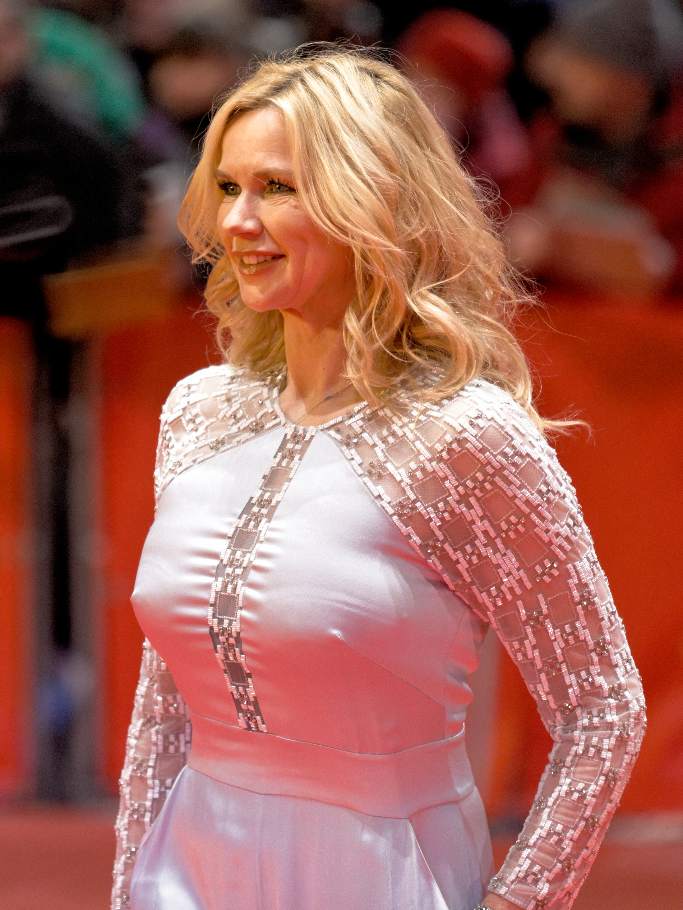 Veronica Ferres bei der Weltpremiere zu Django bei der Berlinale 2017